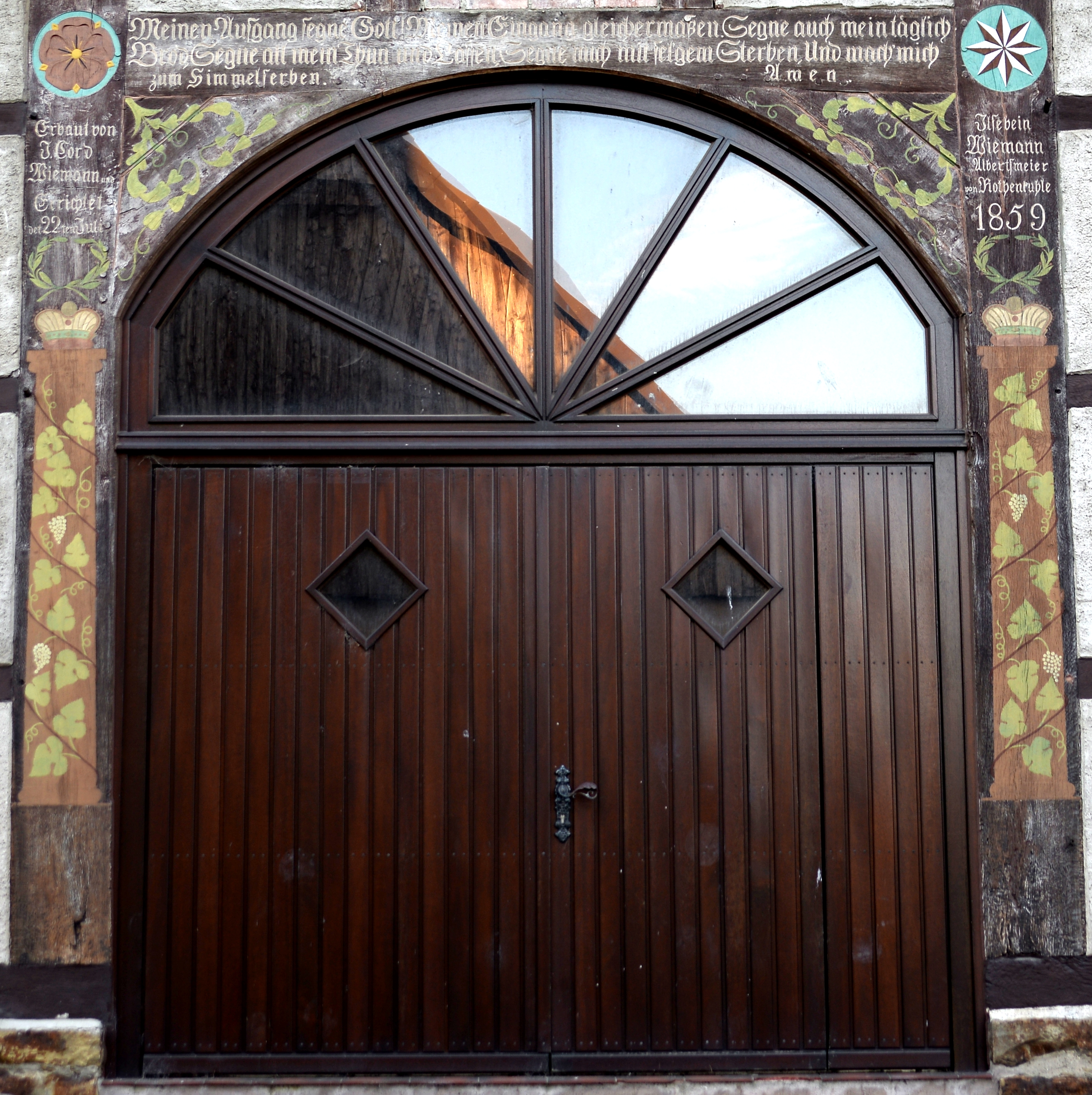 Sommersell, Torbogen This is a photograph of an architectural monument.It is on the list of cultural monuments of Barntrup